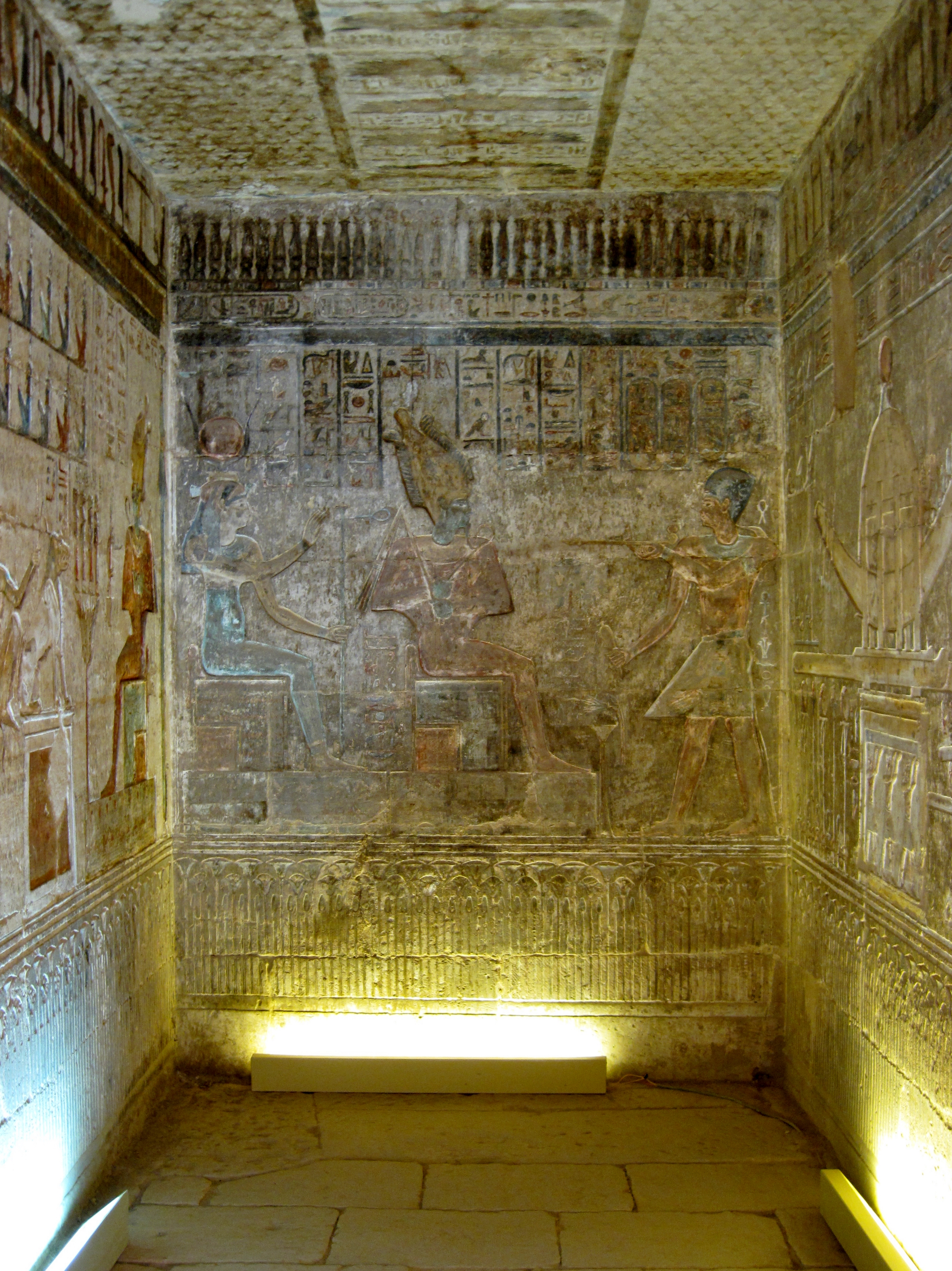 Südwestkapelle für Amun-Sokar-Osiris im Hathor-Tempel von Deir el-Medina („Kloster der Stadt“), altägyptisch Set Maat („Platz der Wahrheit“), in Theben-West bei Luxor, Ägypten